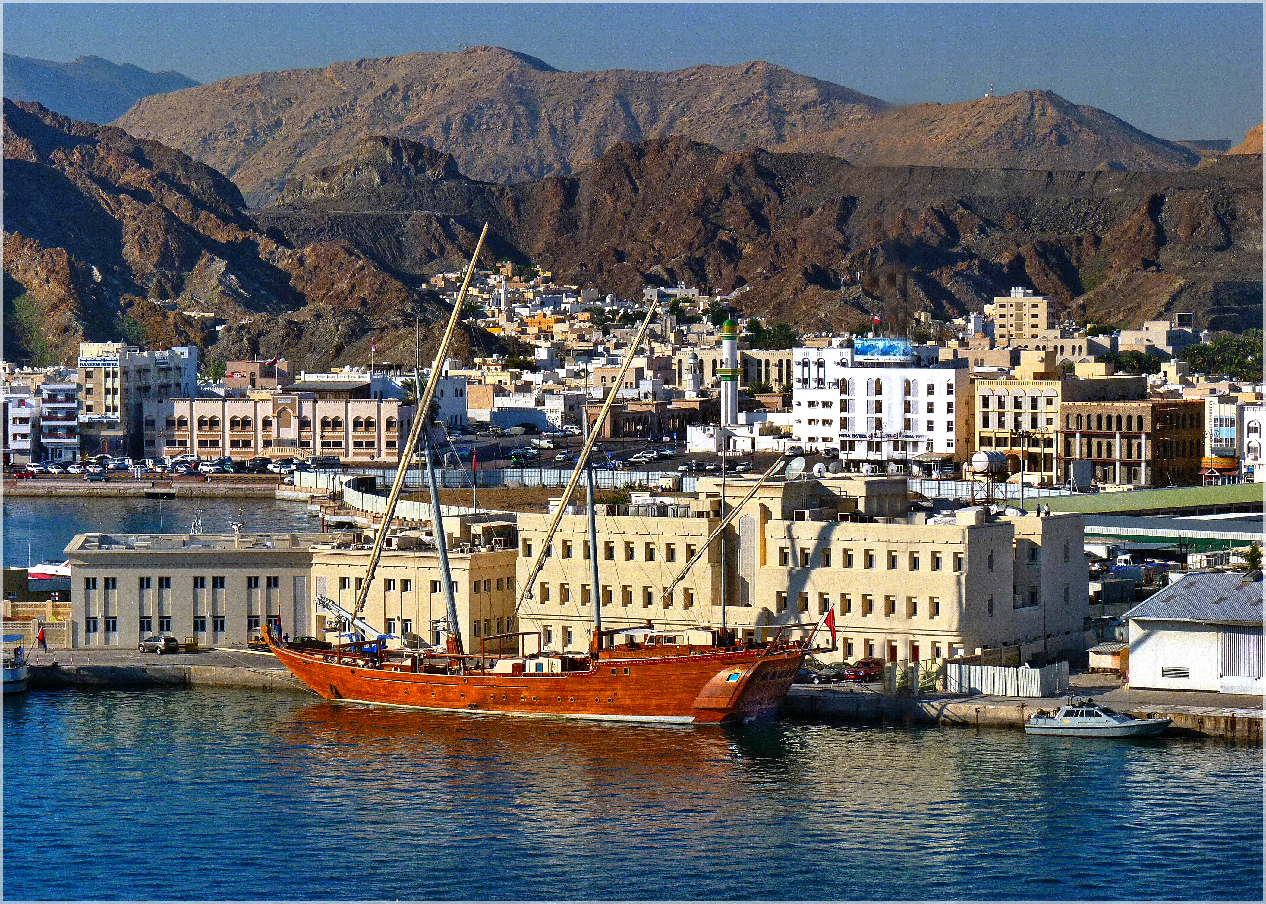 Muscat